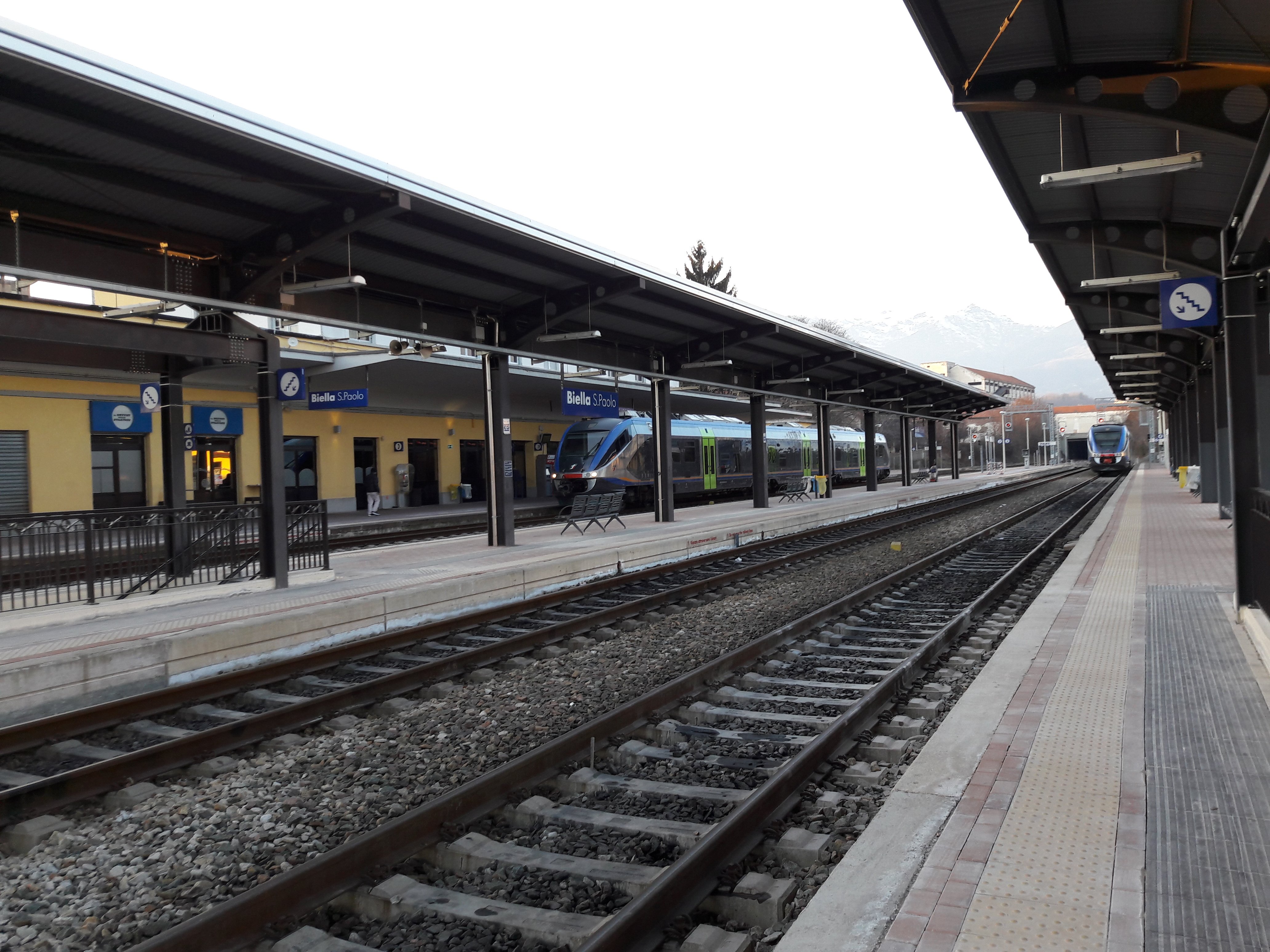 Stazione lato binari, in direzione Novara.